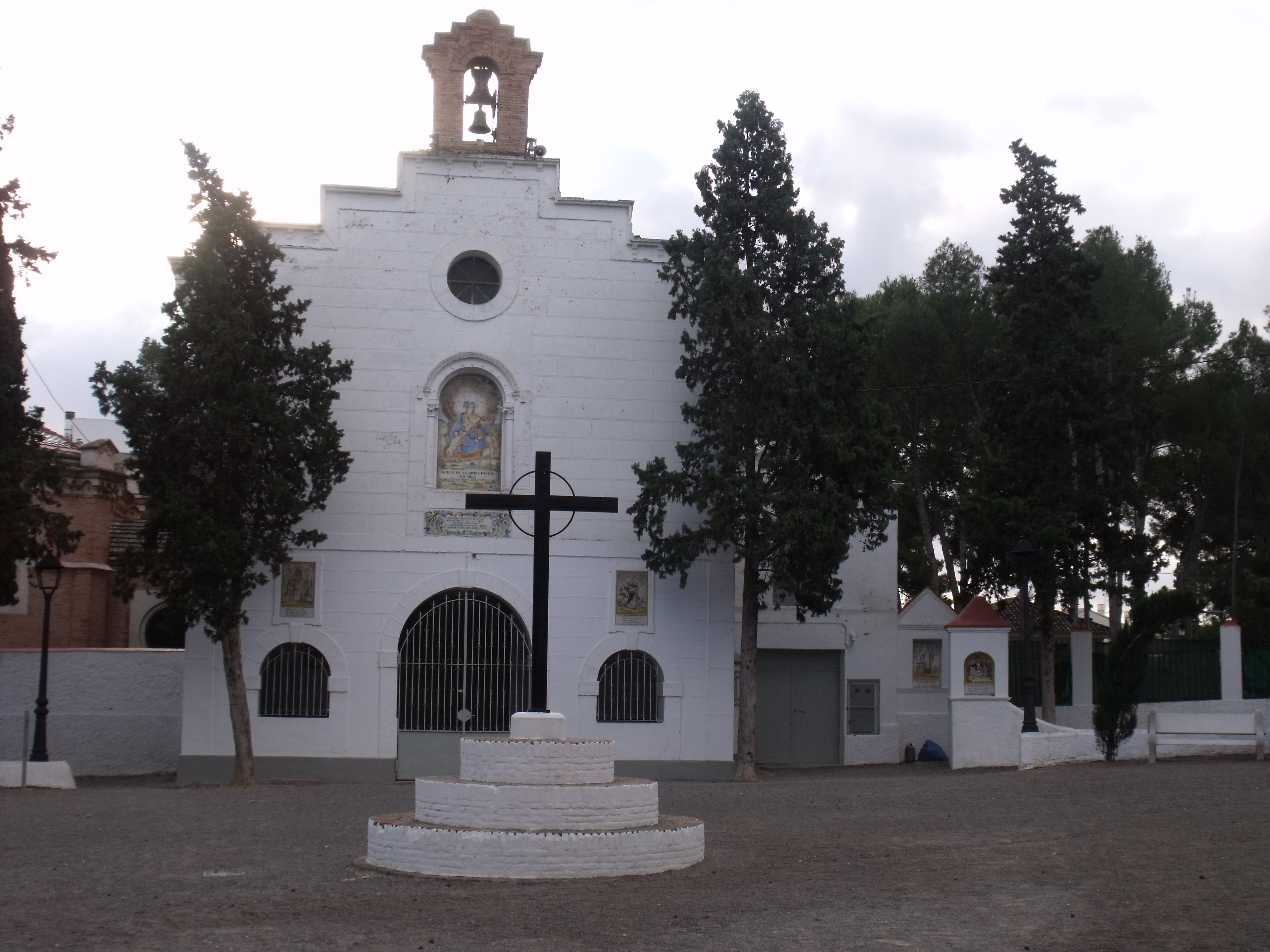 Ermita de la Divina Pastora. Bétera, España.